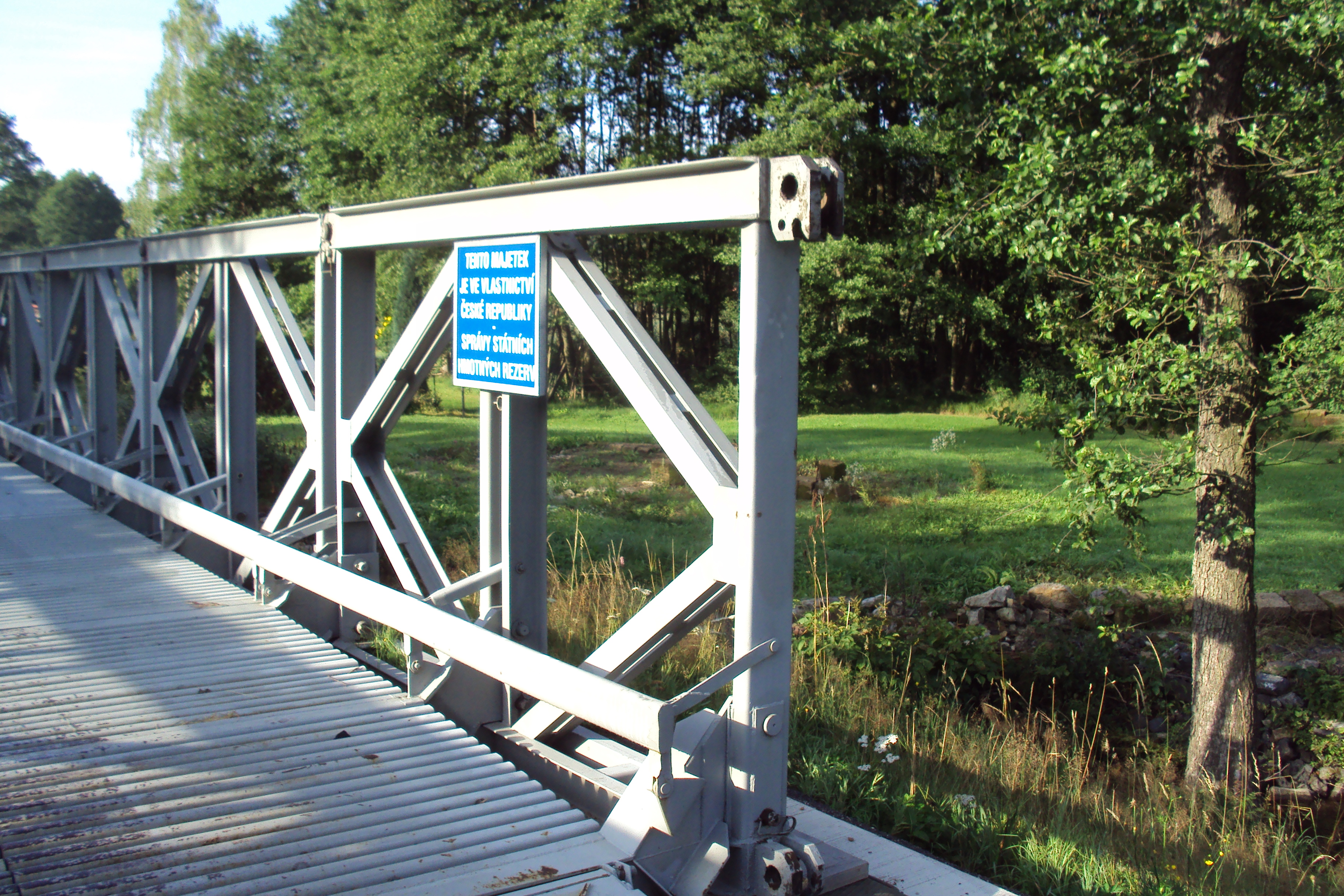 Státem půjčený most přes Svitávku v Mařeničkách místo povodní zničeného